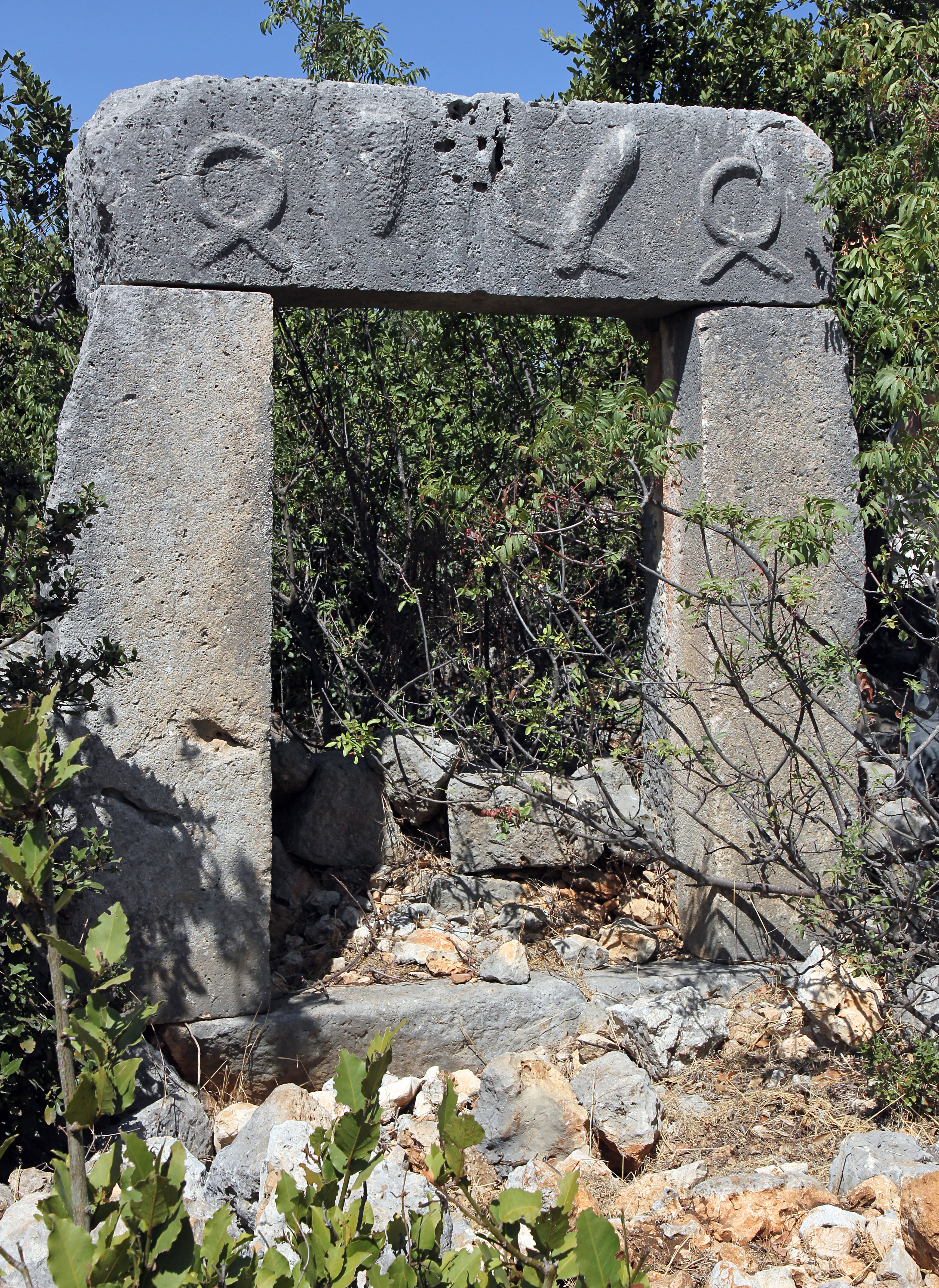 Villa Rustica bei Kızkalesi in der Südtürkei, Türsturz mit Olbischen Zeichen nördlich der Villa